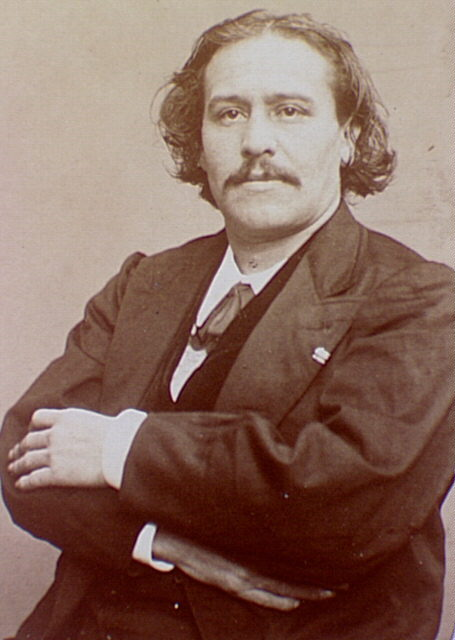 Maxime Lisbonne (1839-1905)